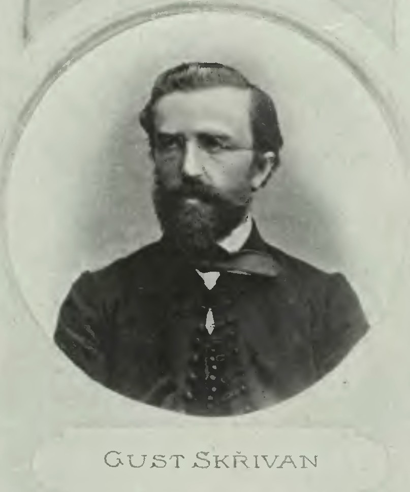 Portrét – Gustav Skřivan (1831-1866), Český matematik.